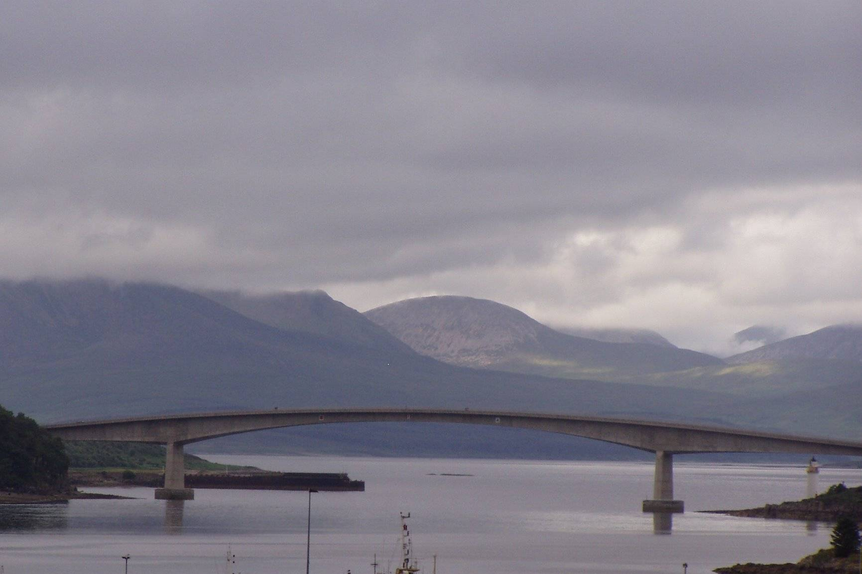 Le pont de Skye sur le loch Aillse. Quand donc repasserai-je le pont ?.